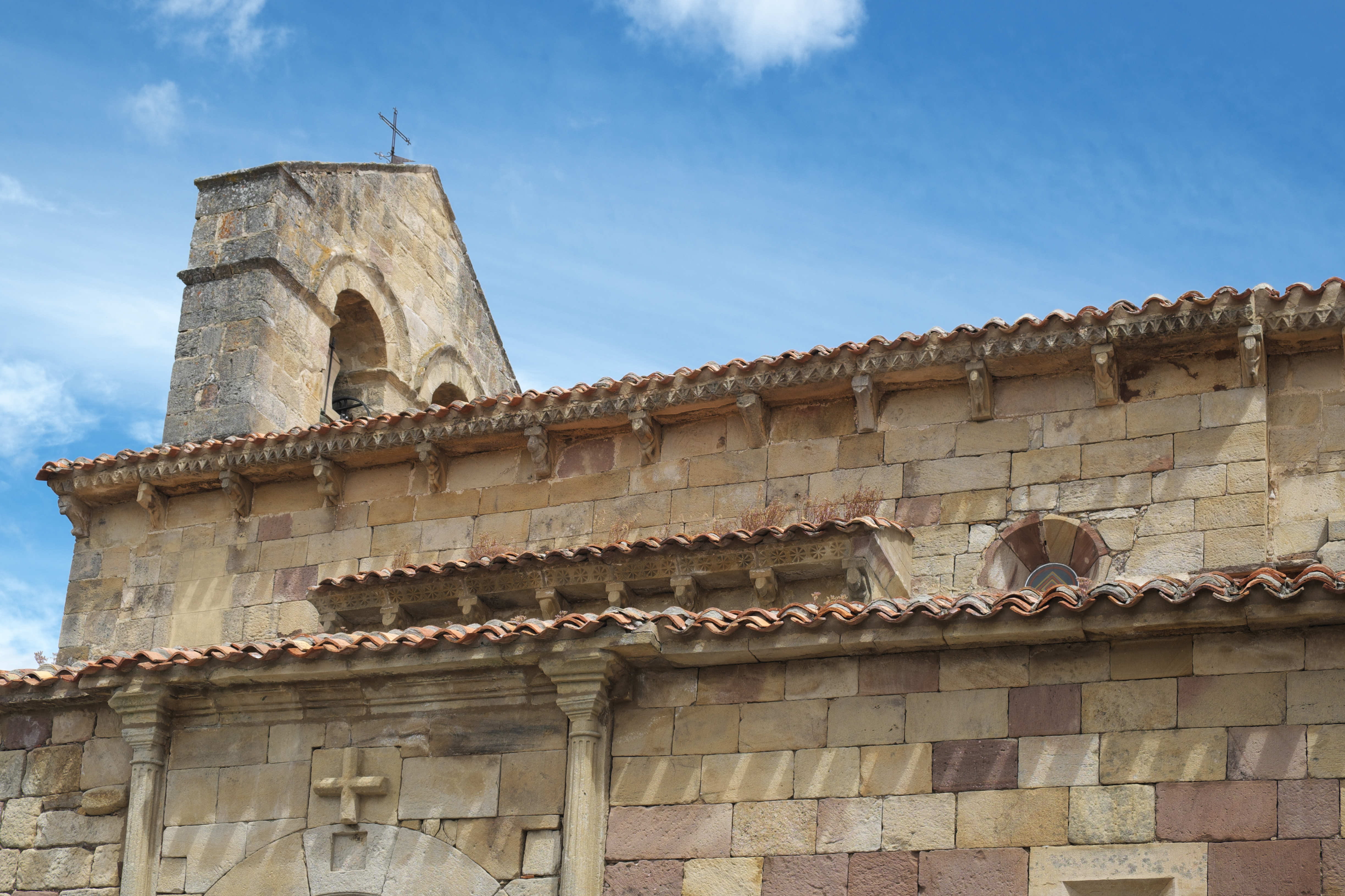 Kirche San Cornelio y San Cipriano in Revilla de Santullán in der Gemeinde Barruelo de Santullán in der Provinz Palencia (Kastilien-León/Spanien), Kragsteine unter dem Dachansatz